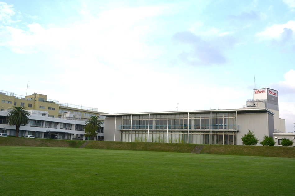 クノール食品株式会社の外観写真